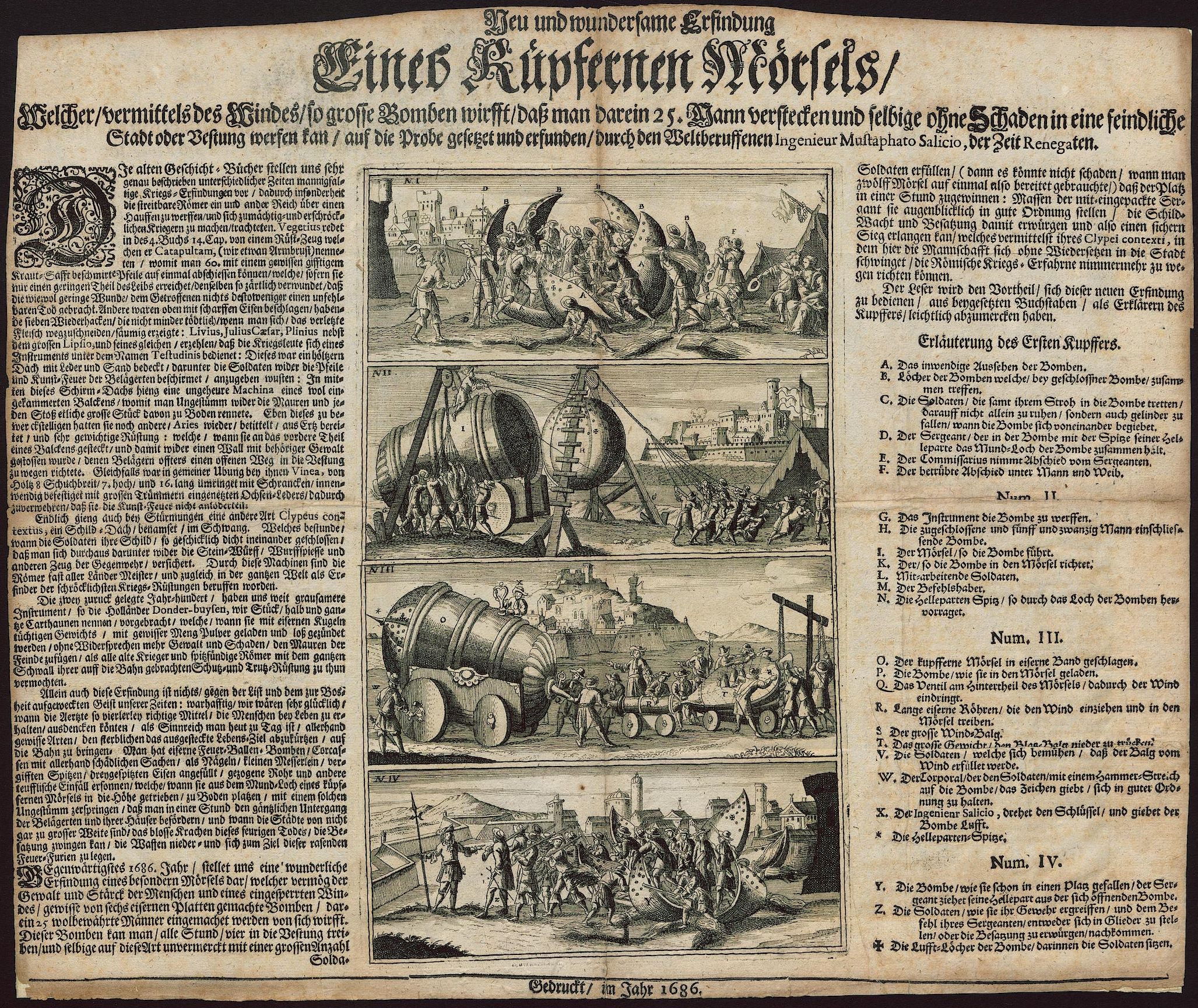 Mustaphato Salicio: "Neu und wundersame Erfindung Eines Küpfernen Mörsels, Welcher vermittels des Windes, so grosse Bomben wirfft, daß man darein 25. Mann verstecken und selbige ohne Schaden in eine feindliche Stadt oder Vestung werfen kan: auf die Probe gesetzet und erfunden, durch den Weltberuffenen Ingenieur Mustaphato Salicio, der Zeit Renegaten"